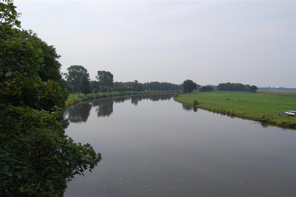 De rivier de Eems in het noorden van Duitsland.